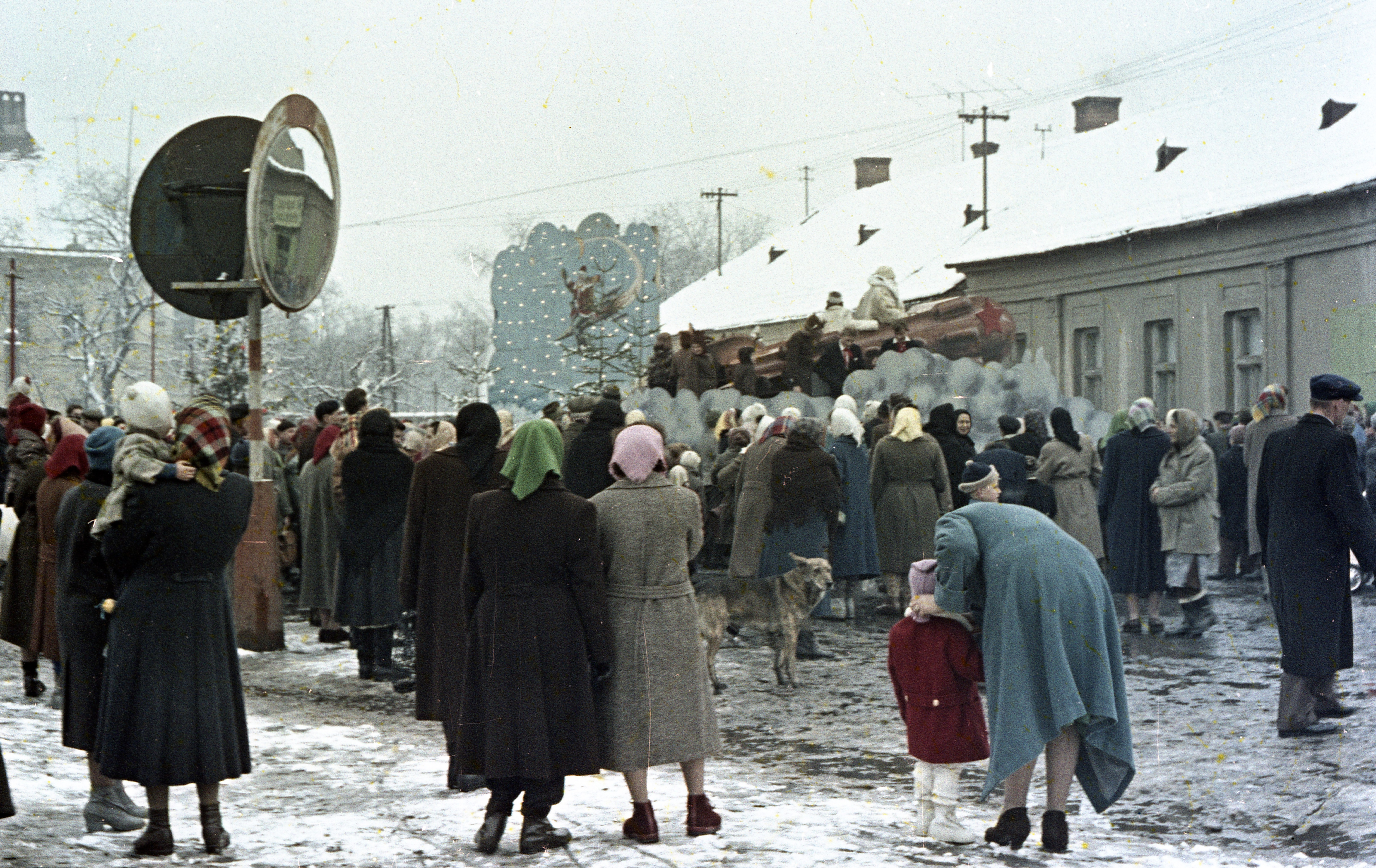 ulica Hlavná (Fő utca), háttérben balra a Berchtold-kastély. Location: Slovakia, Filakovo Tags: colorful, mirror, Red Star, Czechoslovakia Title: ulica Hlavná (Fő utca), háttérben balra a Berchtold-kastély.